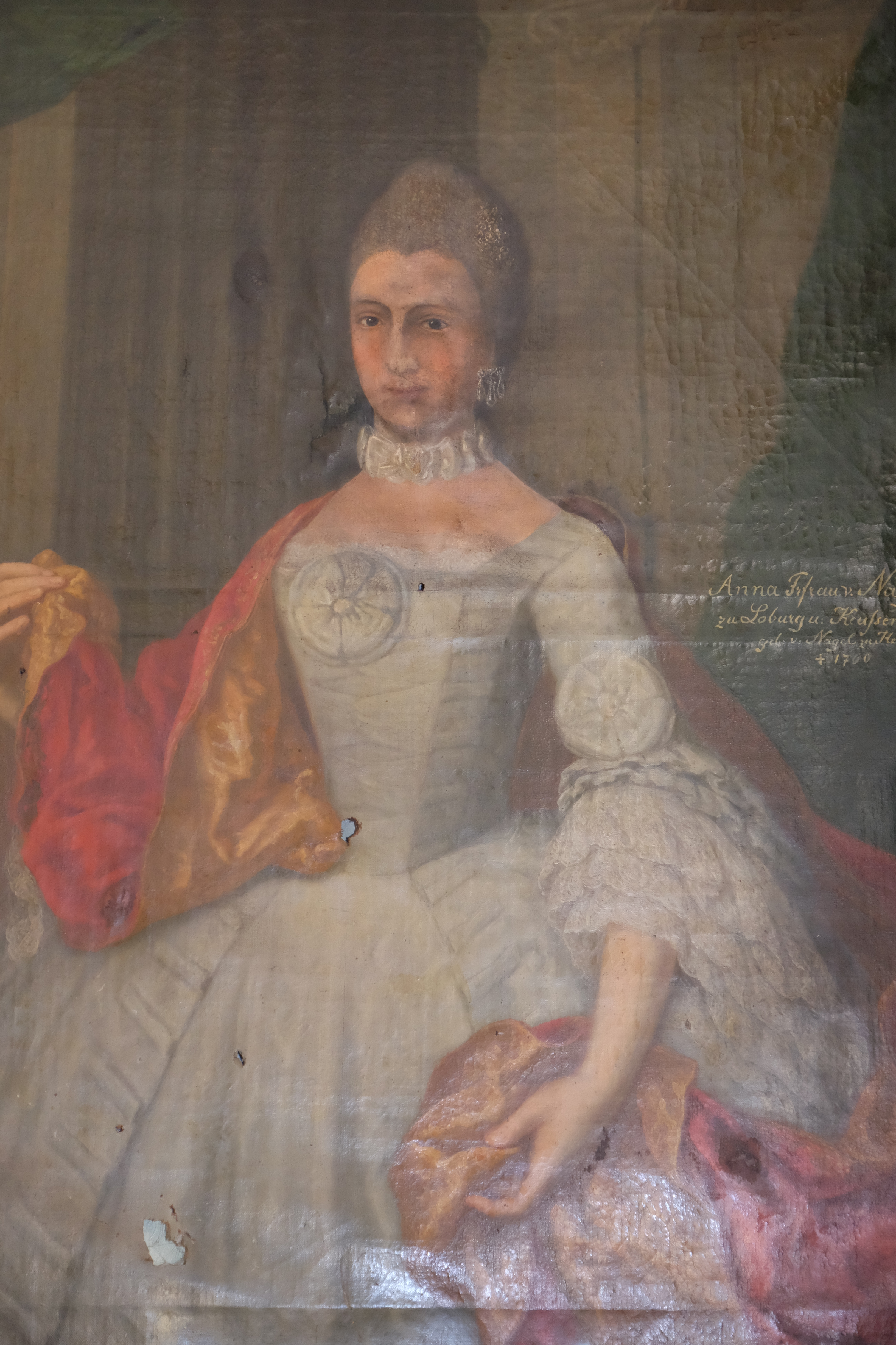 Schloss Tatenhausen mit freundlicher Genemigung von Freiin von Teufel zu Birkensee